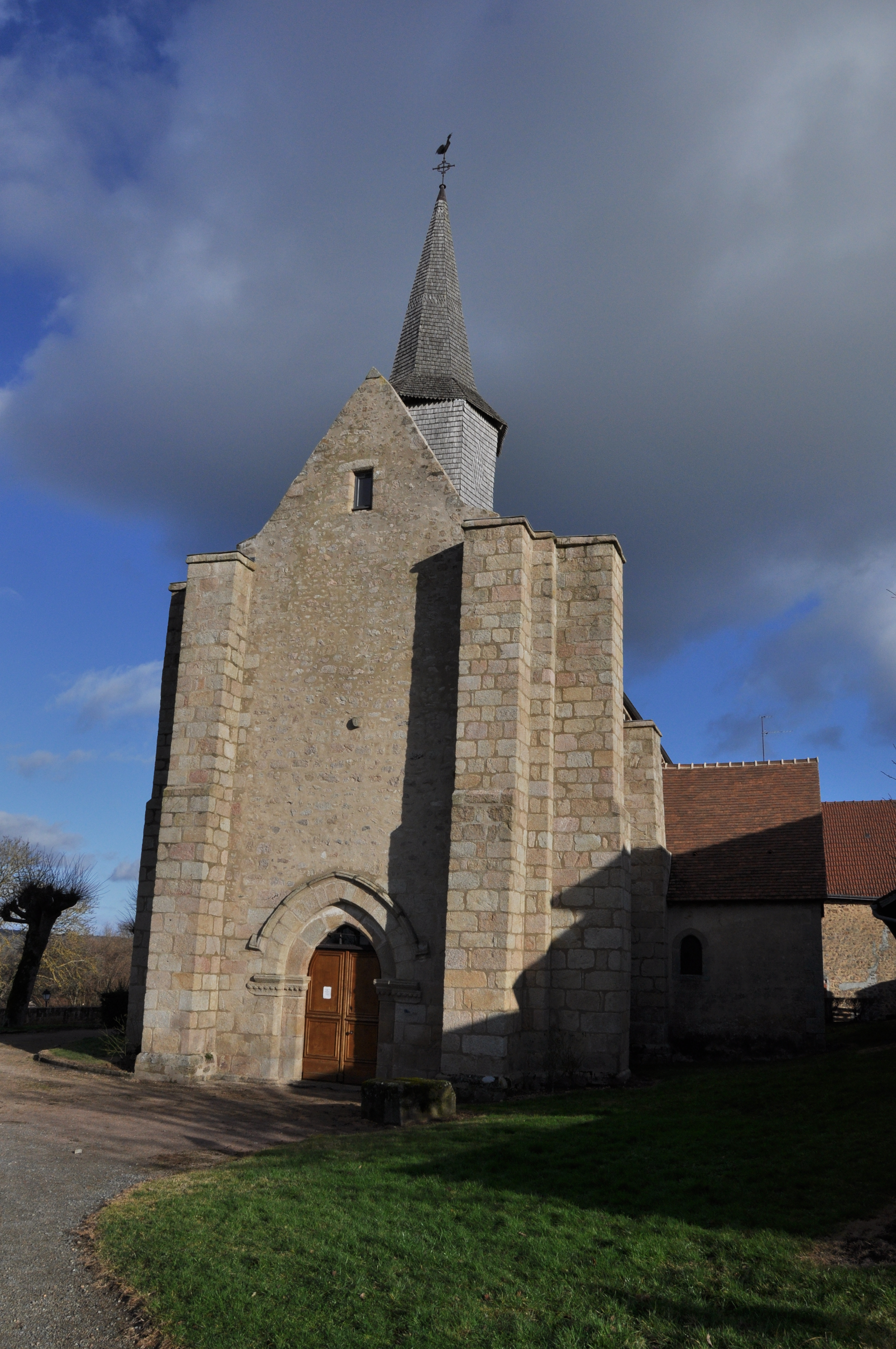 Eglise du Bourg-d'Hem (Creuse)